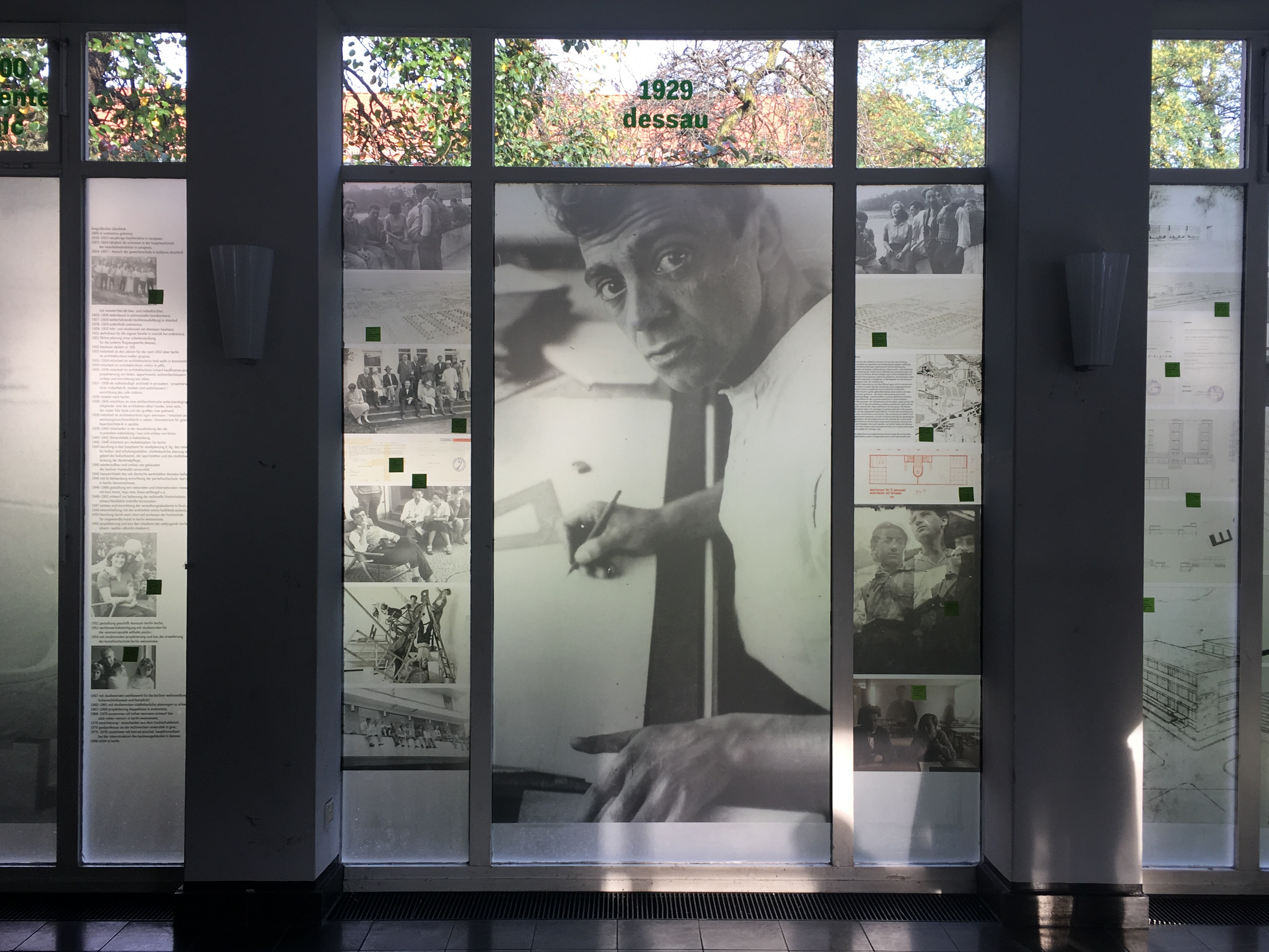 Fotografien und Dokumente zu Selman Selmanagic